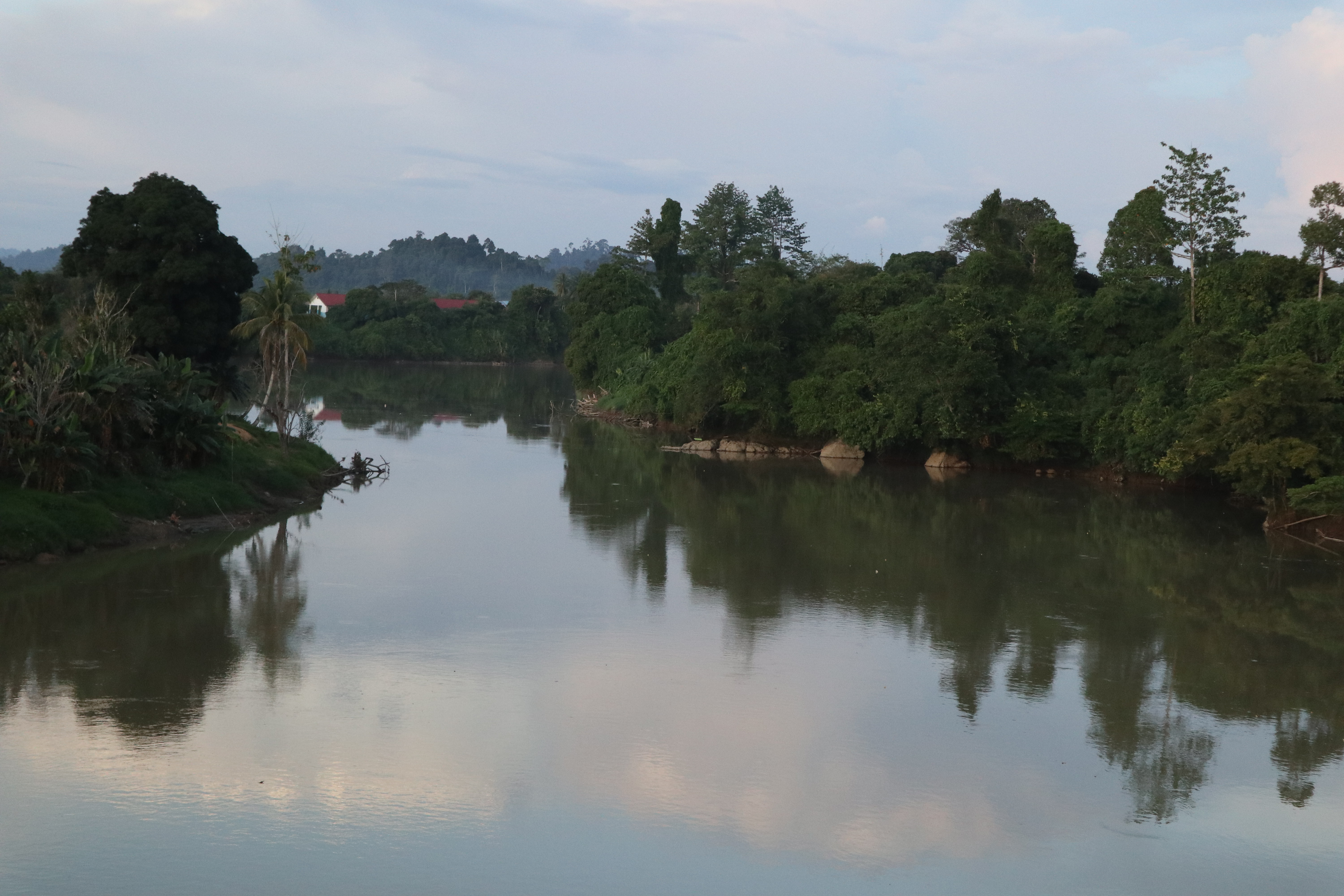 Sungai Malinau yang berhulu di pegunungan kawasan Taman Nasional Kayan Mentarang dan bermuara di kawasan desa Pulau Sapi, Malinau.